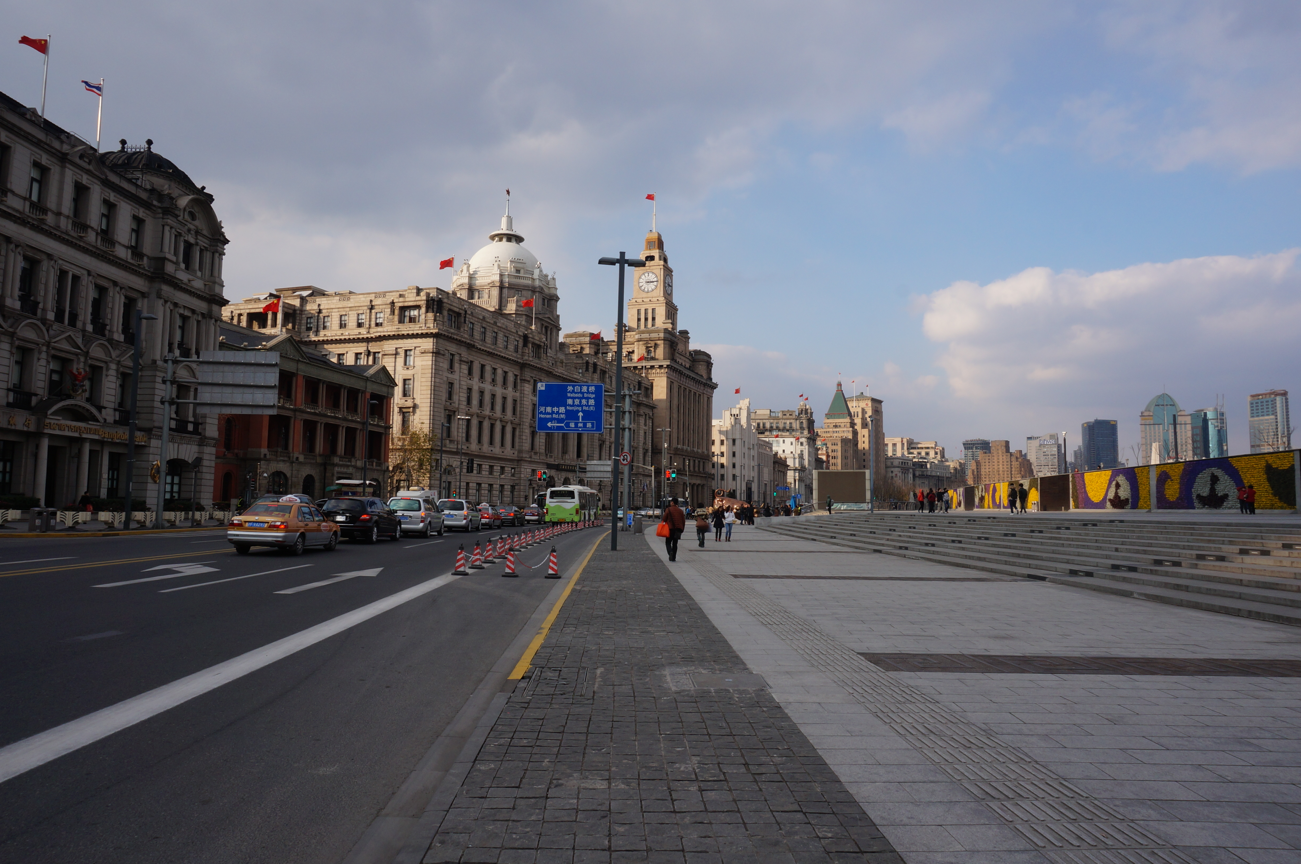 外滩日景；中山东一路街景